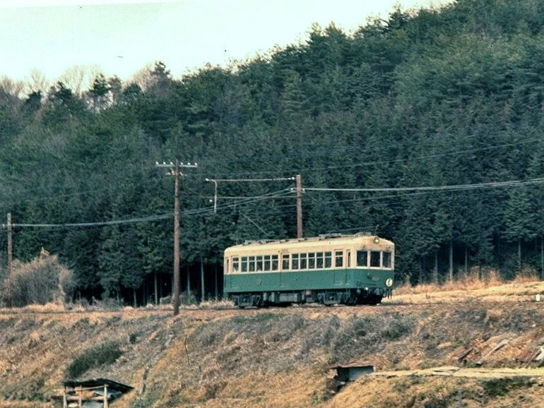 叡電デオ200精華大前付近